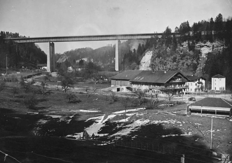 Bayern, Mangfallbrücke Scherl Bilderdienst Die Riesenbrücke über das Mangfalltal Wie ein stolzes Siegeszeichen schwingt sich die Mangfallbrücke über das Mangsalltal, das sie in der gewaltigen Länge von 320 Metern, bei einer Breite von 21 Metern überspannt. Es ist eine der schönsten und architektonisch interessantesten Brücken, die es gibt, und wurde auf Befehl des Führers im Rahmen der Bauten für die Reichsautobahn 28 (München-Landesgrenze Österreich) errichtet. 3506-36 [1936]